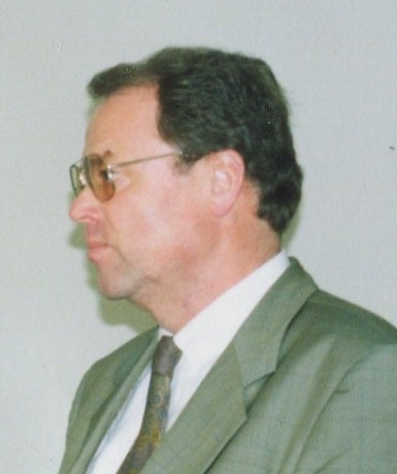 Porträt Jürgen Kellermeier, Chefredakteur Norddeutscher Rundfunk